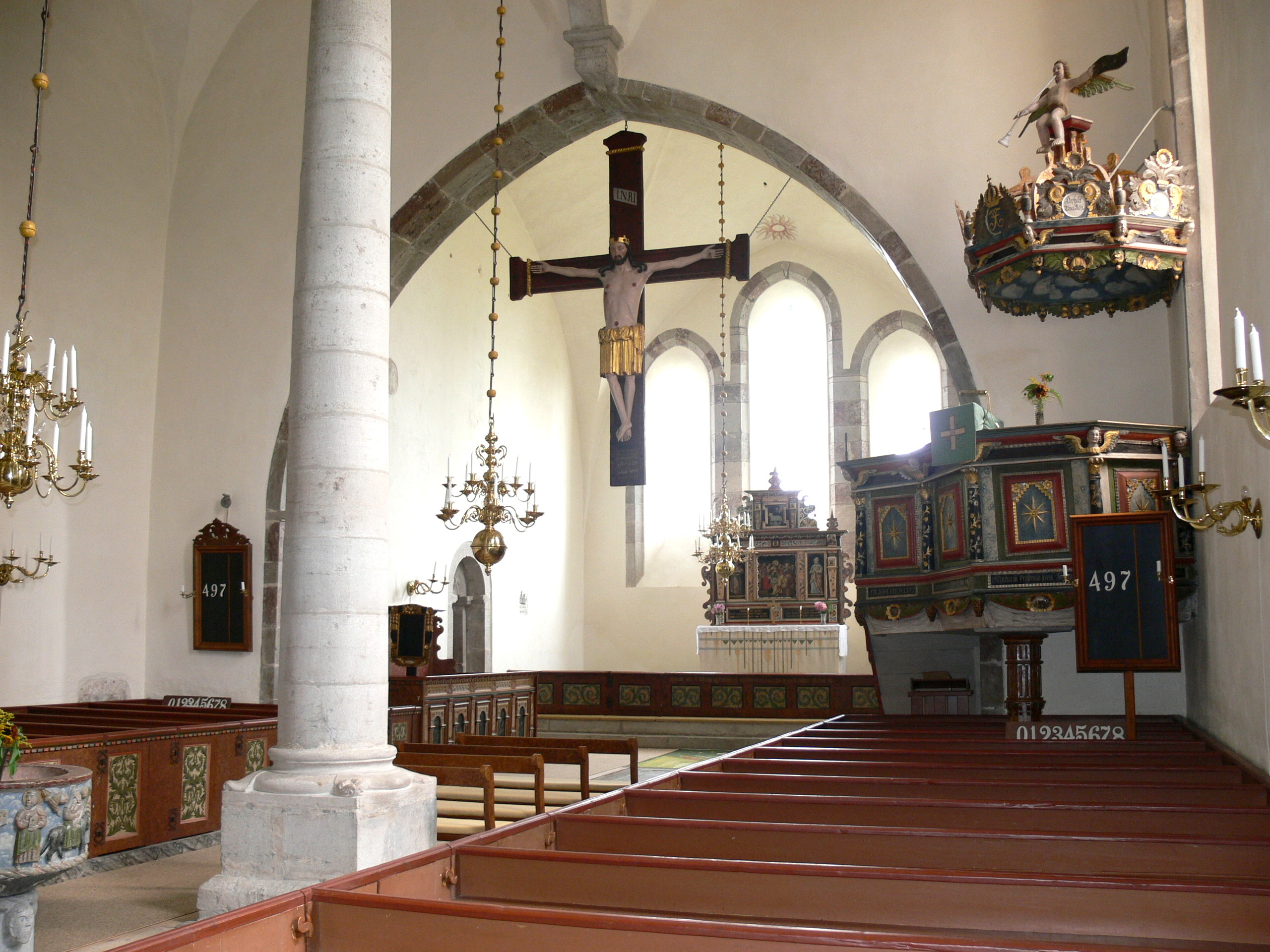 Fole kyrka auf Gotland. Innenraum